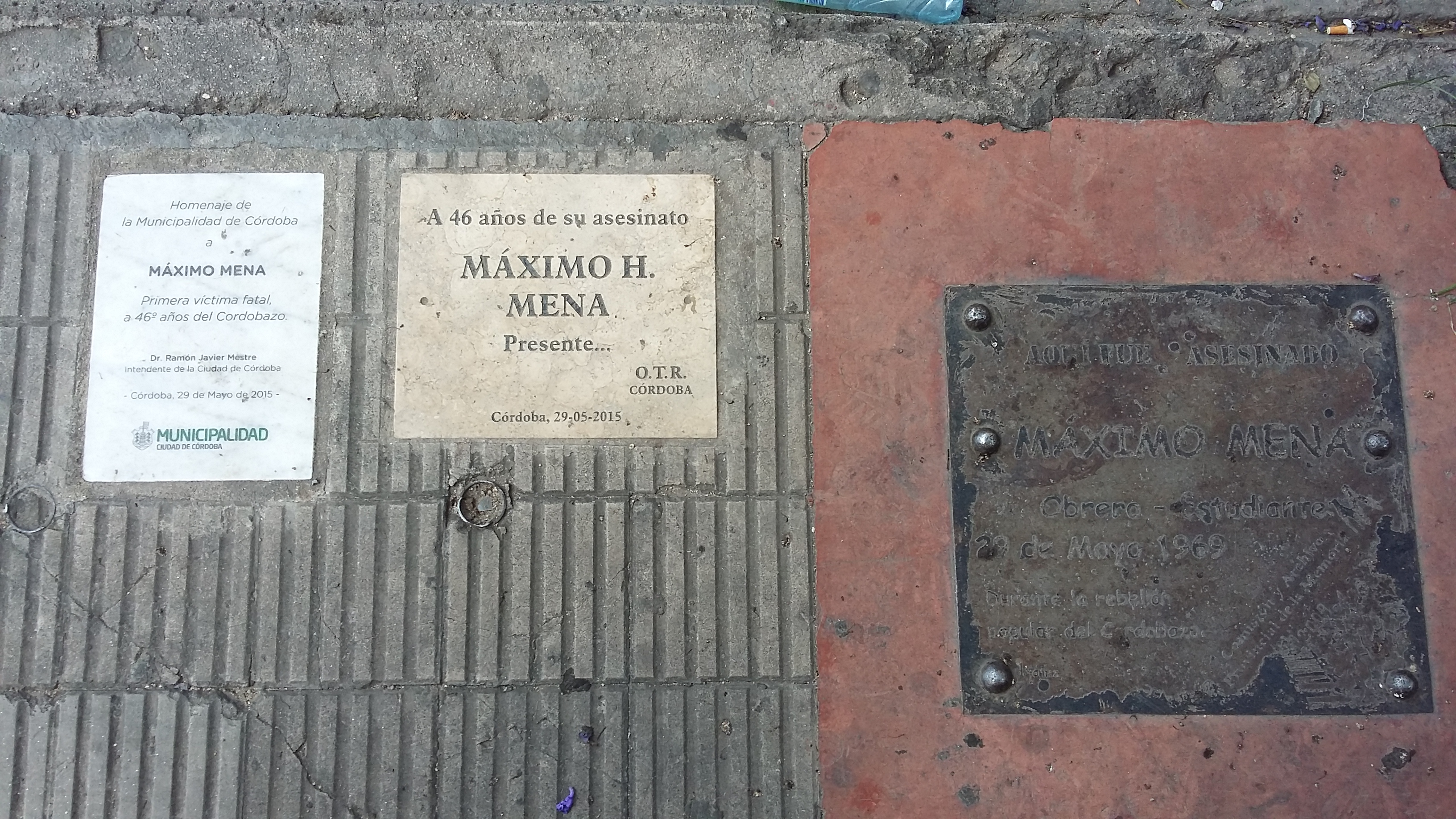 Argentina. Cordobazo. Lugar donde fue asesinado Máximo Mena el 29 de mayo de 1969. Ciudad de Córdoba, esquina Bvrd. San Juan y Arturo M. Bas.